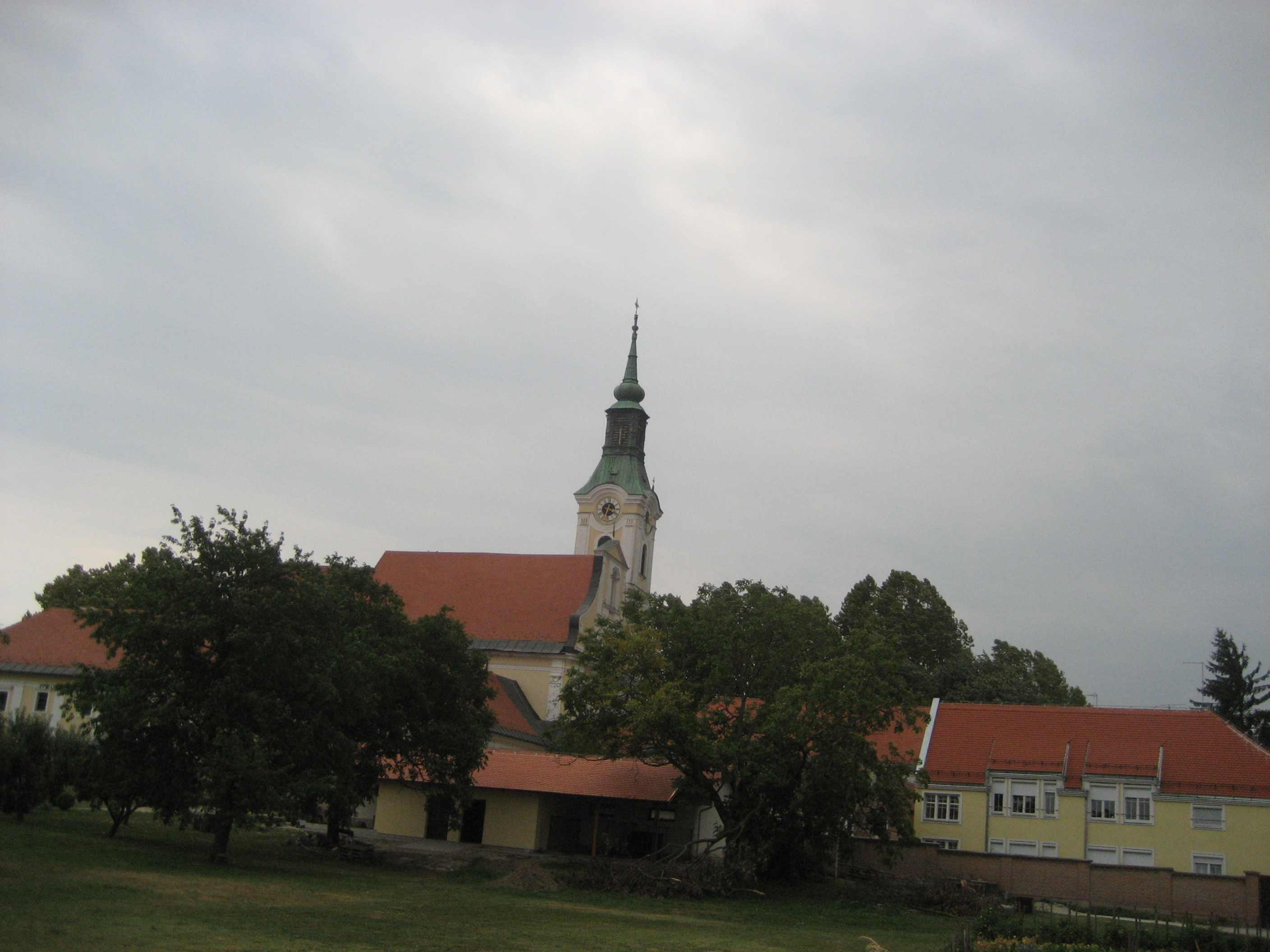 Virovitica, Croatia